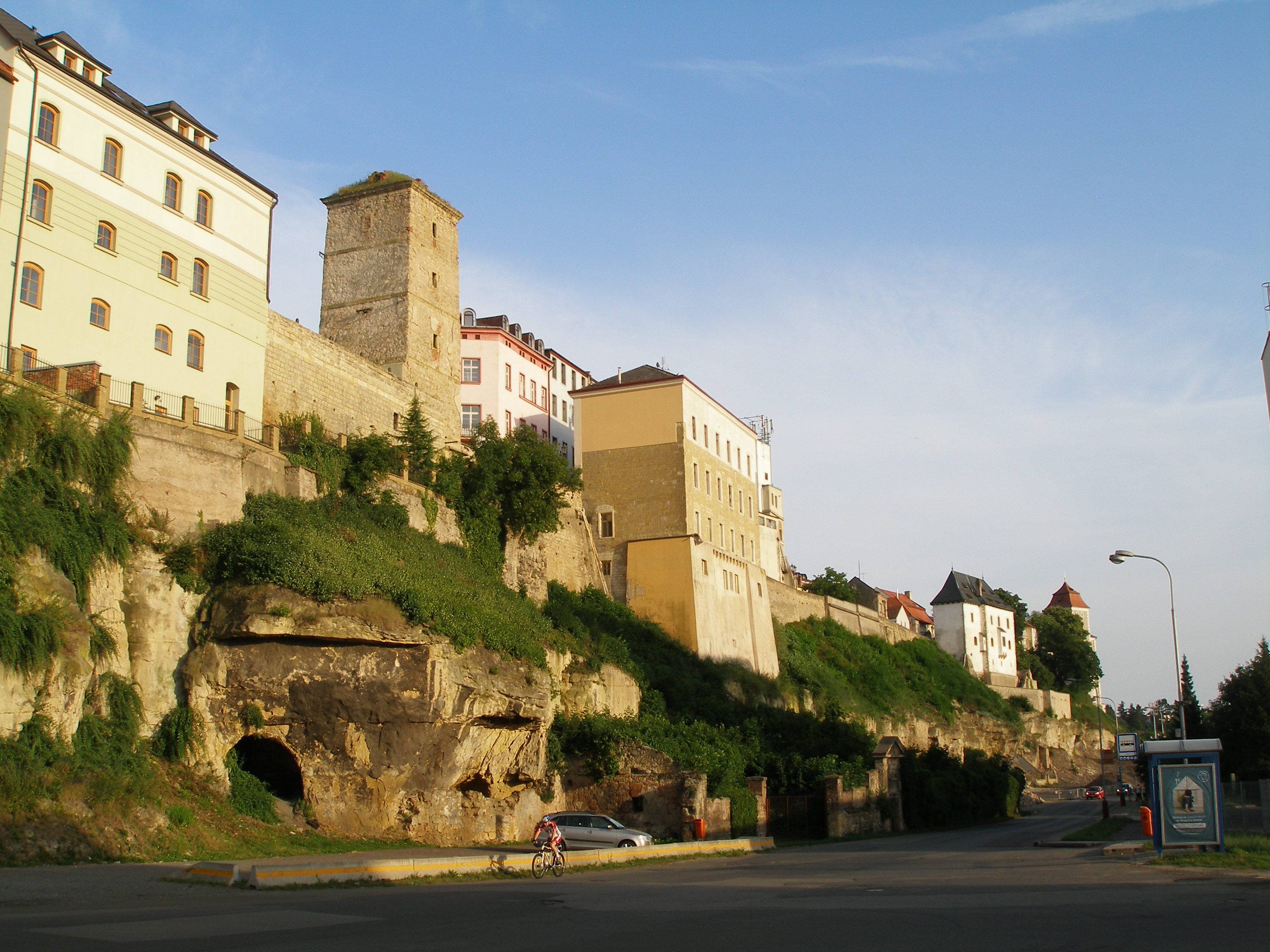 Pohled z Ptácké ulice směrem k ulici Vodkově. V pozadí je s bílou zdí a tmavou střechou mladoboleslavský Templ.